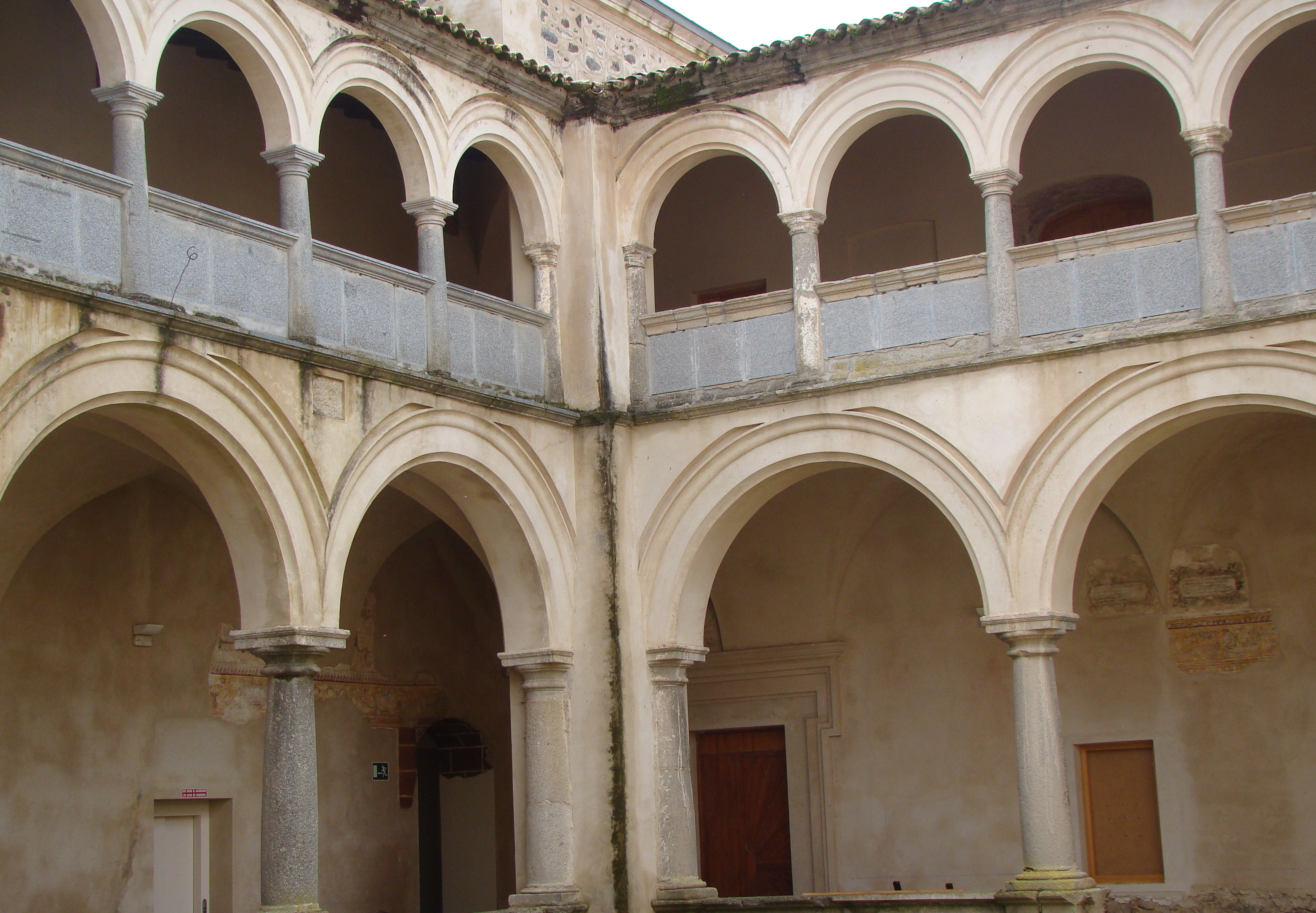 Claustro